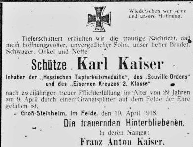 Todesanzeige (April 1918) für einen Träger des Souville-Abzeichens des hessischen Reserve-Infanterie-Regiments Nr. 81